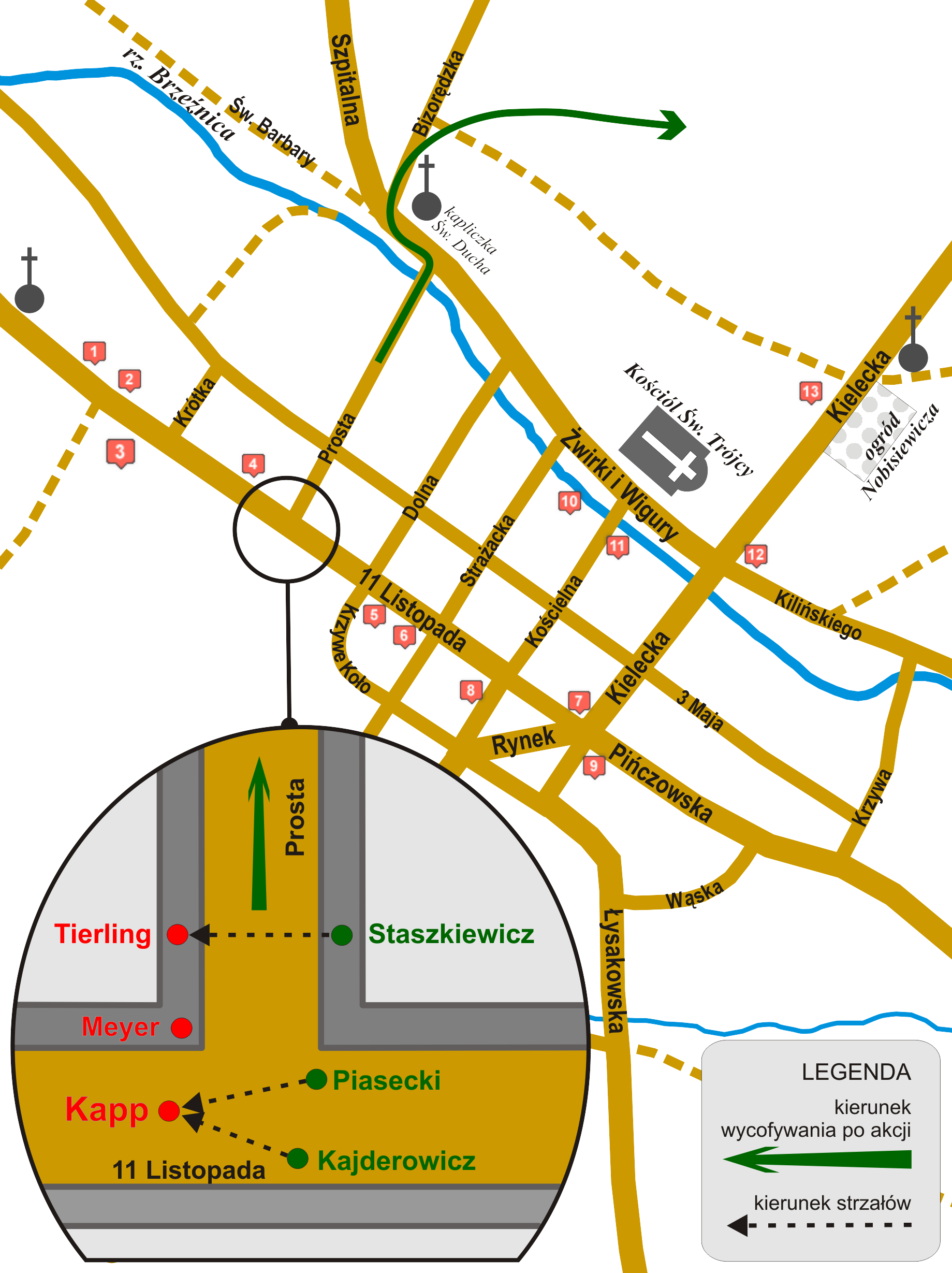 Na podstawie: Wojciech Borzobohaty „JODŁA”, Andrzej Ropelewski „W jędrzejowskim obwodzie AK”